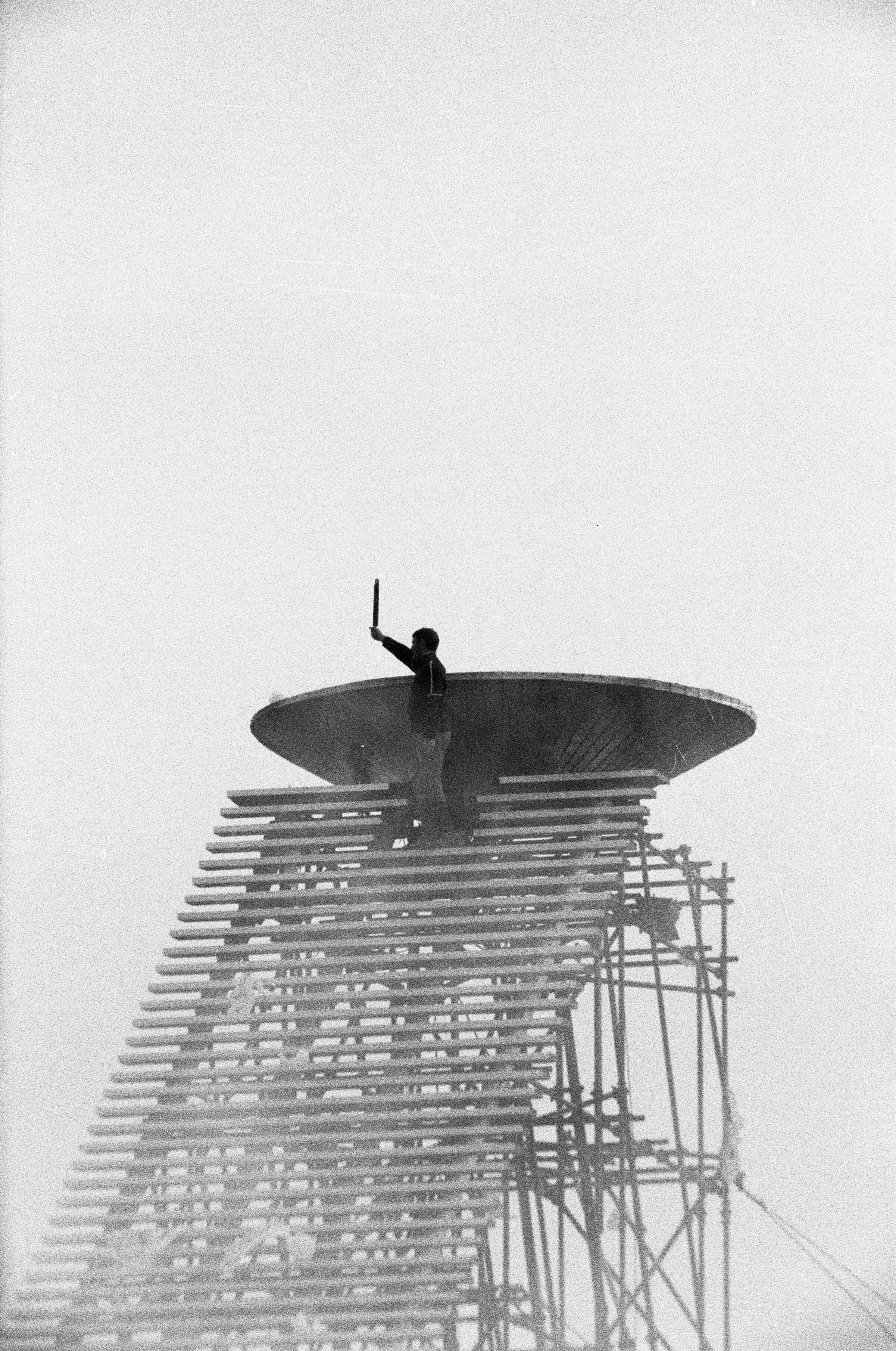 Collectie / Archief : Fotocollectie Anefo Reportage / Serie : [ onbekend ] Beschrijving : Opening Olympische winterspelen te Grenoble, Alain Calma ontsteekt Olympische vlam Datum : 6 februari 1968 Locatie : Grenoble Persoonsnaam : Alain Calmat Fotograaf : Kroon, Ron / Anefo Auteursrechthebbende : Nationaal Archief Materiaalsoort : Negatief (zwart/wit) Nummer archiefinventaris : bekijk toegang 2.24.01.05 Bestanddeelnummer : 921-0539